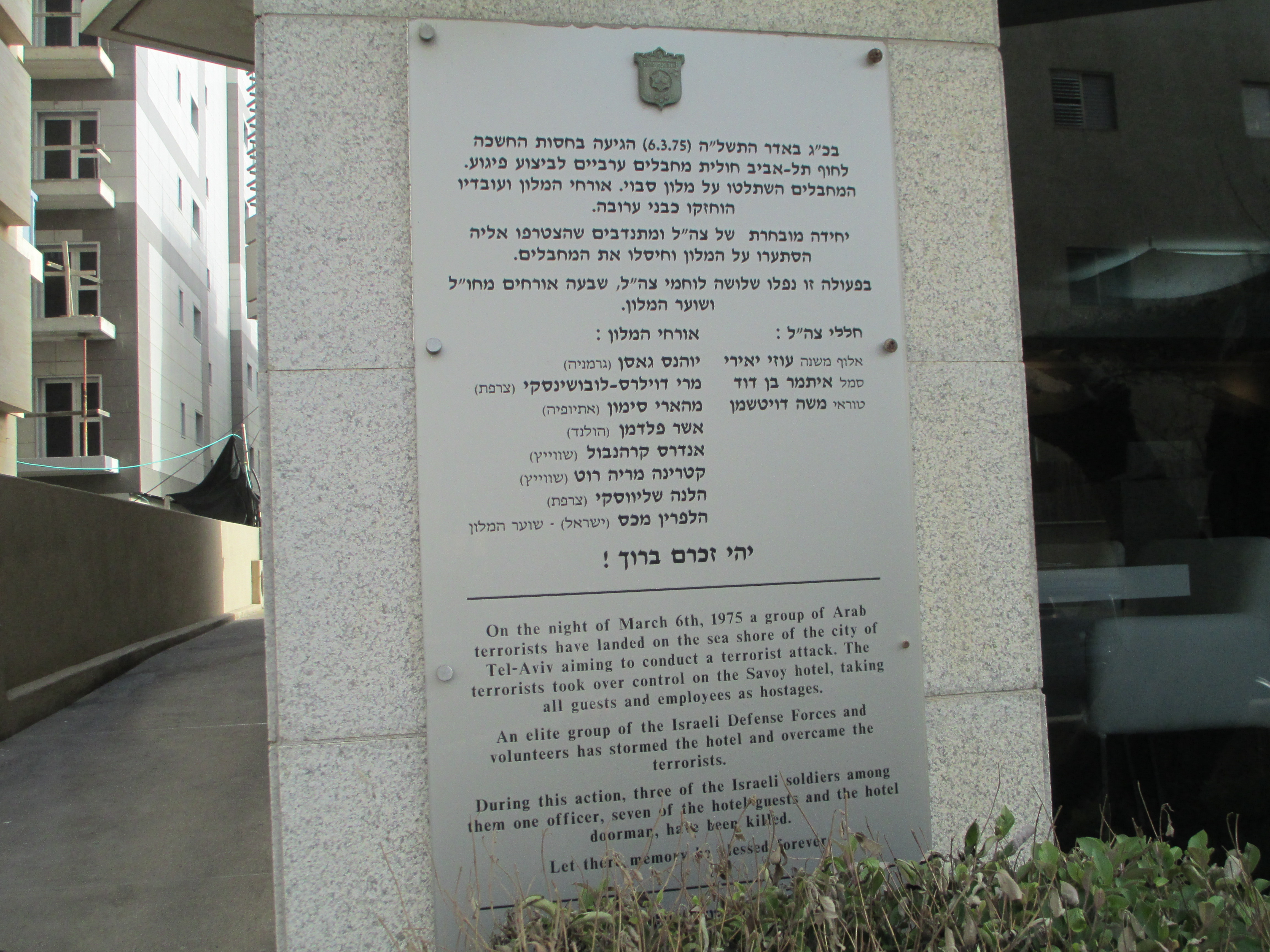 לוחית זיכרון לנרצחי הפיגוע במלון סבוי-בכניסה למלון החדש ברחוב גאולה בתל אביב